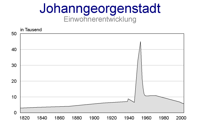 Einwohnerentwicklung von Johanngeorgenstadt, selbst gezeichnet.